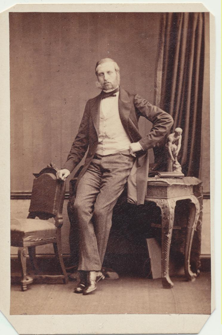 Philippe de Belgique, comte de Flandre. Photographie prise à Londres.